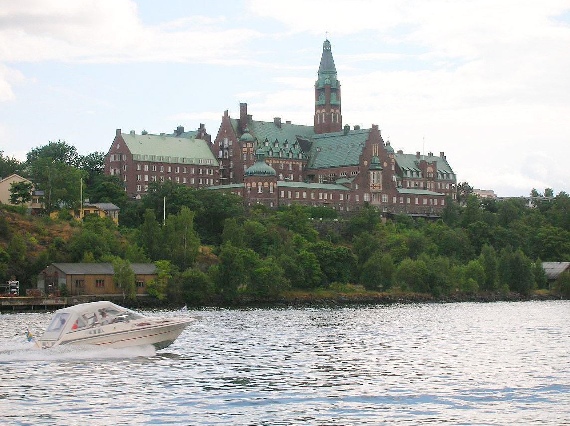 Danvikshem, Nacka, Sweden.